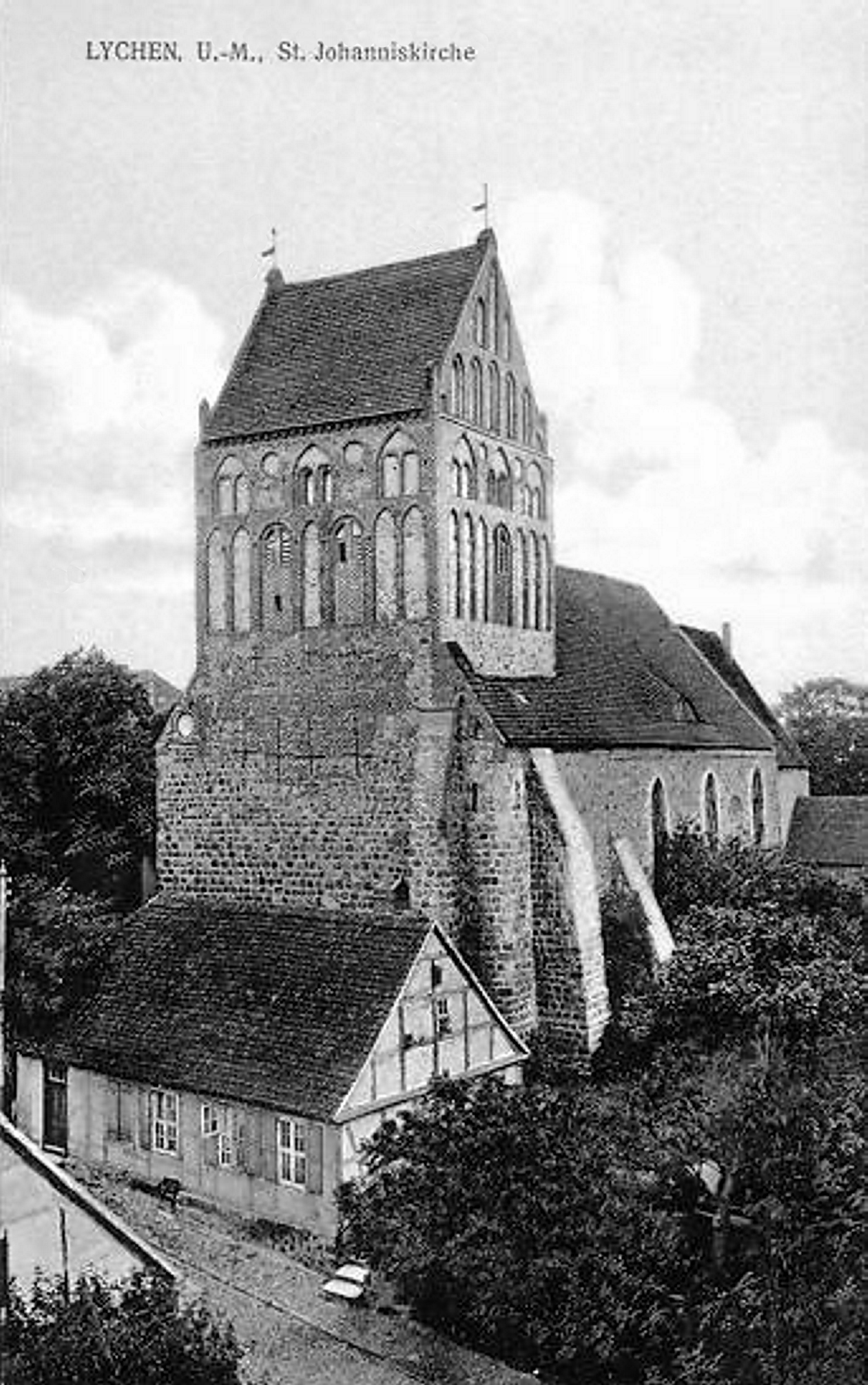 Johanneskirche Lychen anno 1919 (Name auf dem Foto falsch geschrieben)